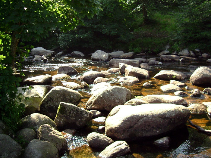 River Dart at Dartmeet.